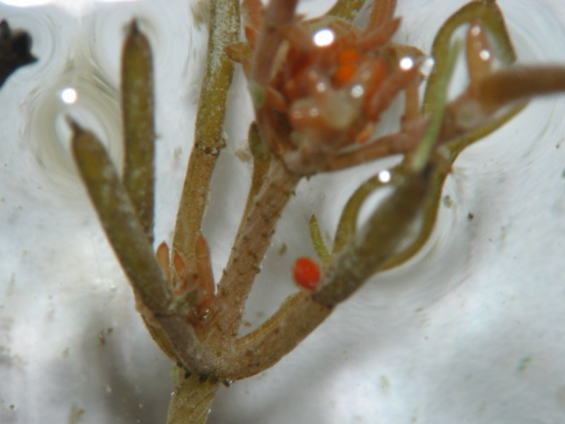 Geweih-Armleuchteralge Chara tomentosa, Spross, Müritz-Gebiet